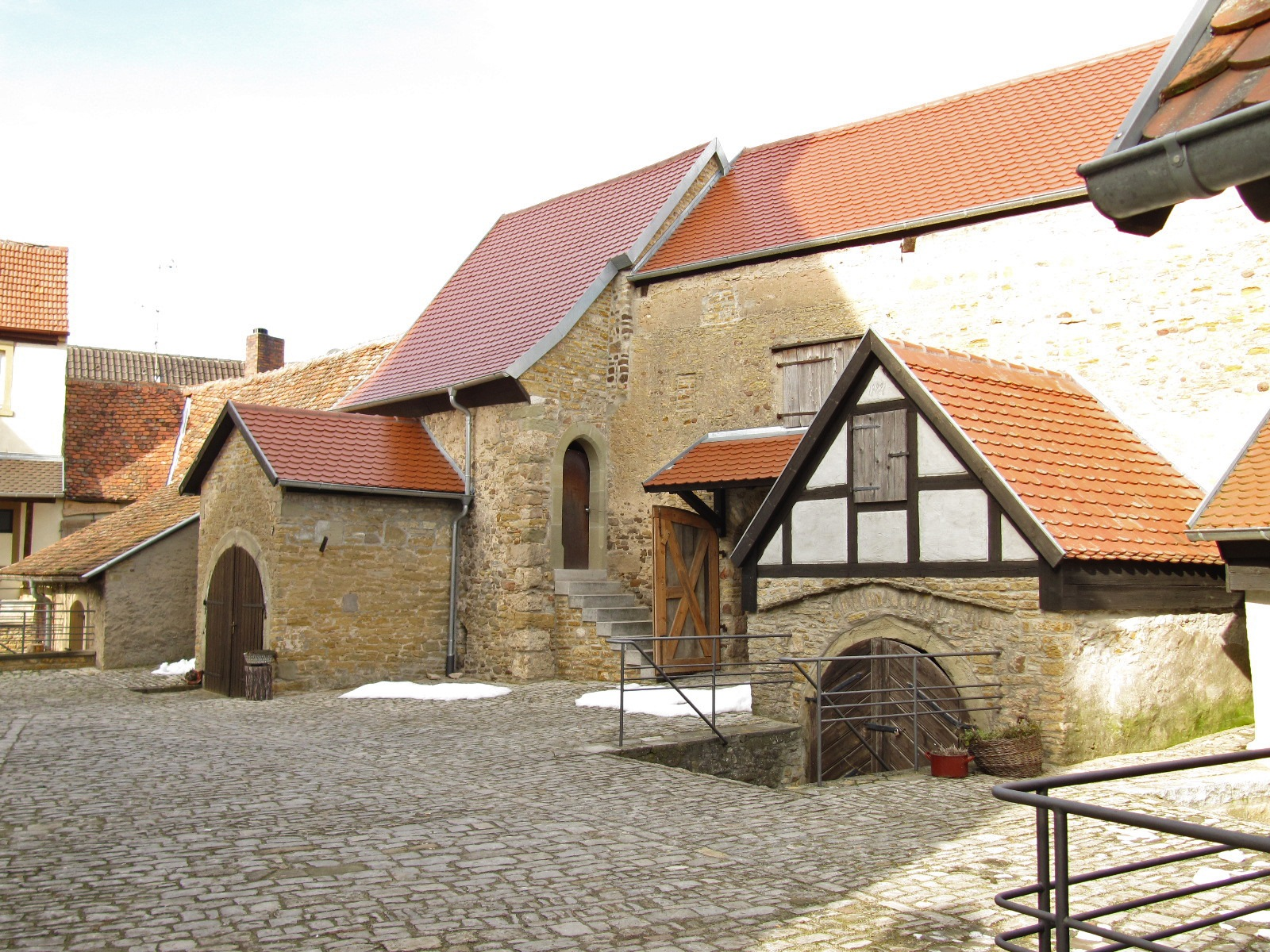 Gaden und Kellerhälse in der Kirchenburg Kleinlangheim